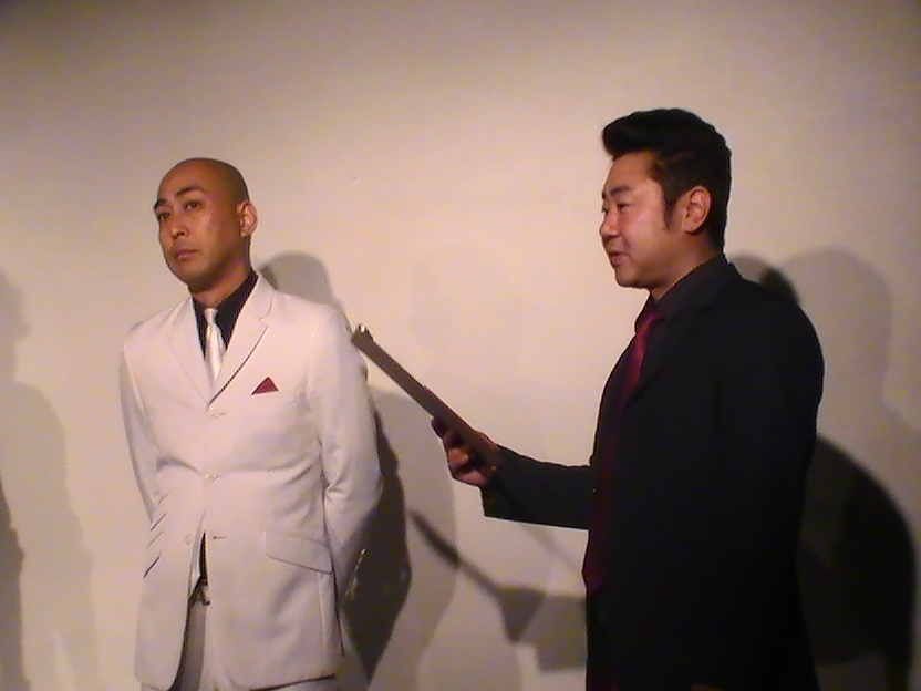 錦鯉 (お笑いコンビ 2017年5月28日)